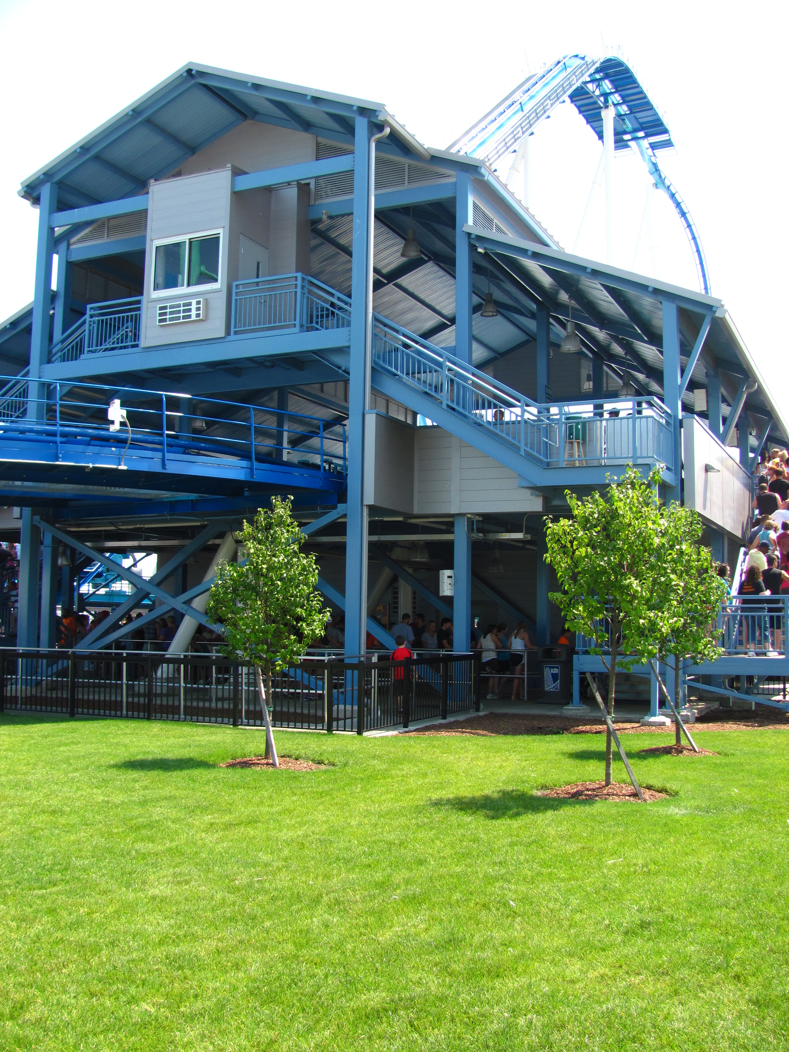 Cedar Point 060